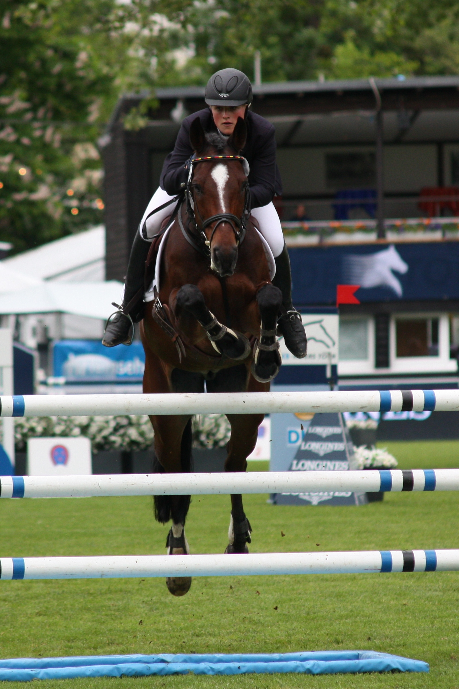 77. Internationanles Wiesbadener Pfingstunier 2013, CIC *** Vielseitigkeitsprüfung Springen, Freya Füllgraebe auf Oje Oje Personality rights warning Although this work is freely licensed or in the public domain, the person(s) shown may have rights that legally restrict certain re-uses unless those depicted consent to such uses. In these cases, a model release or other evidence of consent could protect you from infringement claims.